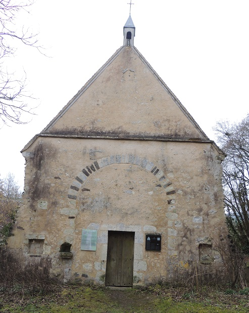 Chapelle Saint-Hilaire des Noyers, "facade" occidentale avec 3 niches et une porte rectangulaire ordinaire entourée de 2 pannonceaux d'affichage, une arcade légèrement surbaissée au dessus, puis le toit et son clocheton